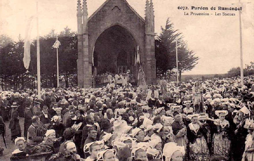 Le pardon de Rumengol vers 1930 (carte postale collection Villard)